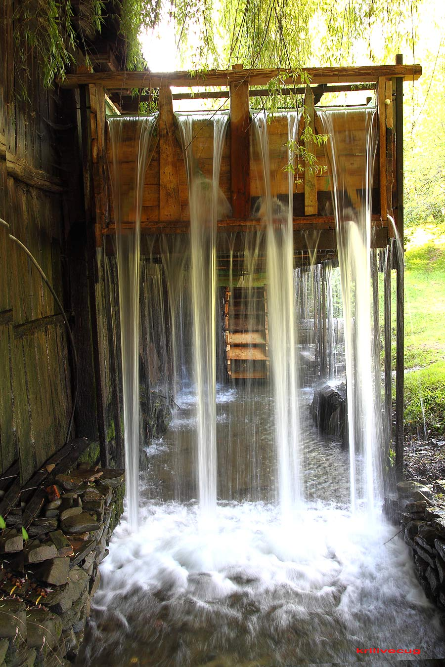 Водяний жолоб кузні Гамора. Село Лисичево. Іршавського району.